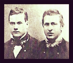 Dekko-brødrene